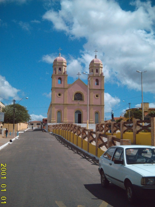 Matriz de São Paulo do Potengi